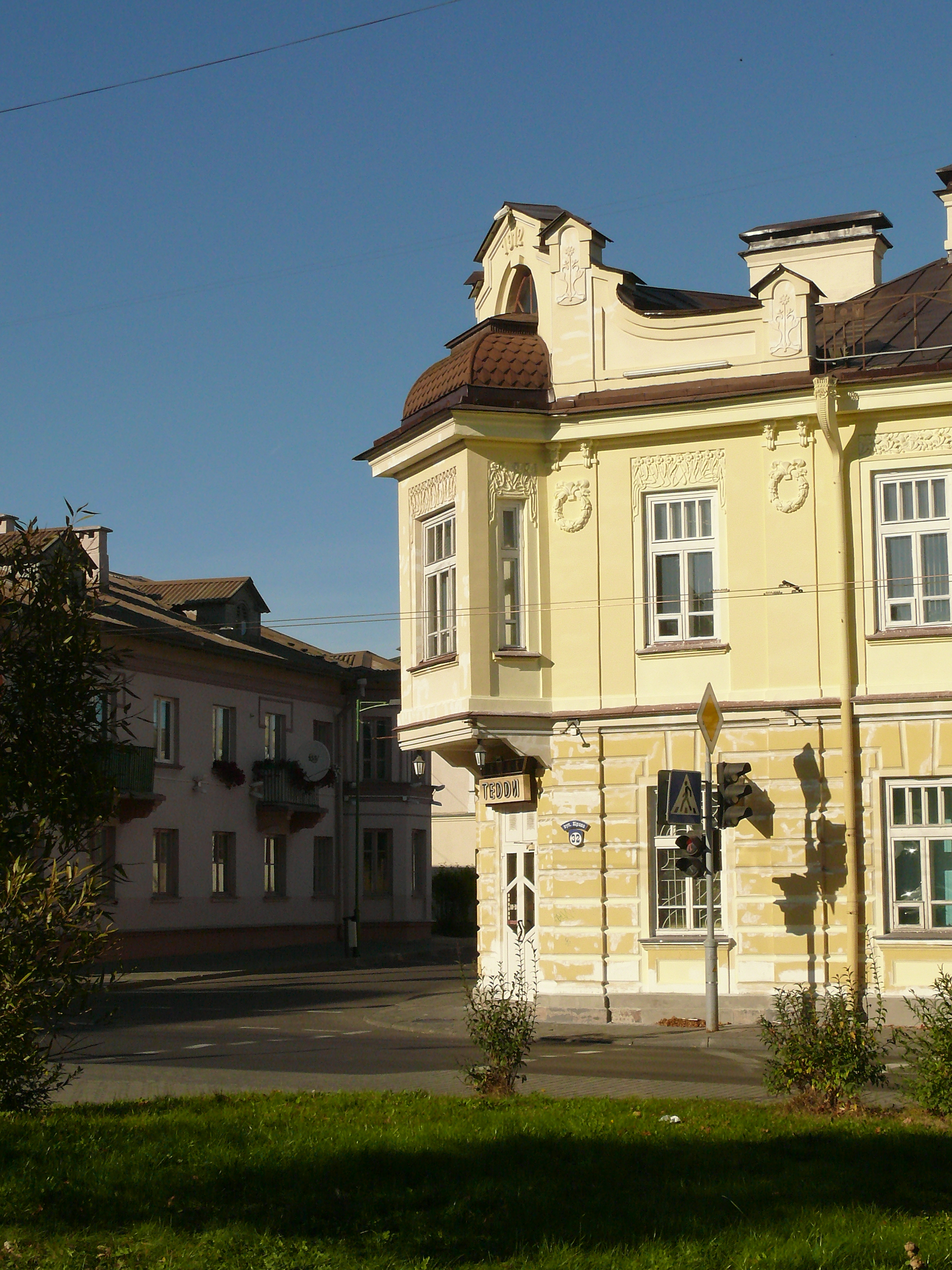 Беларуская (тарашкевіца): Забудова вул. Кірава. г. Горадня This is a photo of Belarusian heritage monument. Reference number: 413Е000655 ( WLM)